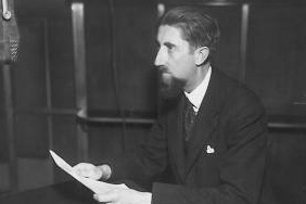 Vladimír Vondráček (1895-1978), český psychiatr, psycholog, farmakolog, endokrinolog a vysokoškolský pedagog